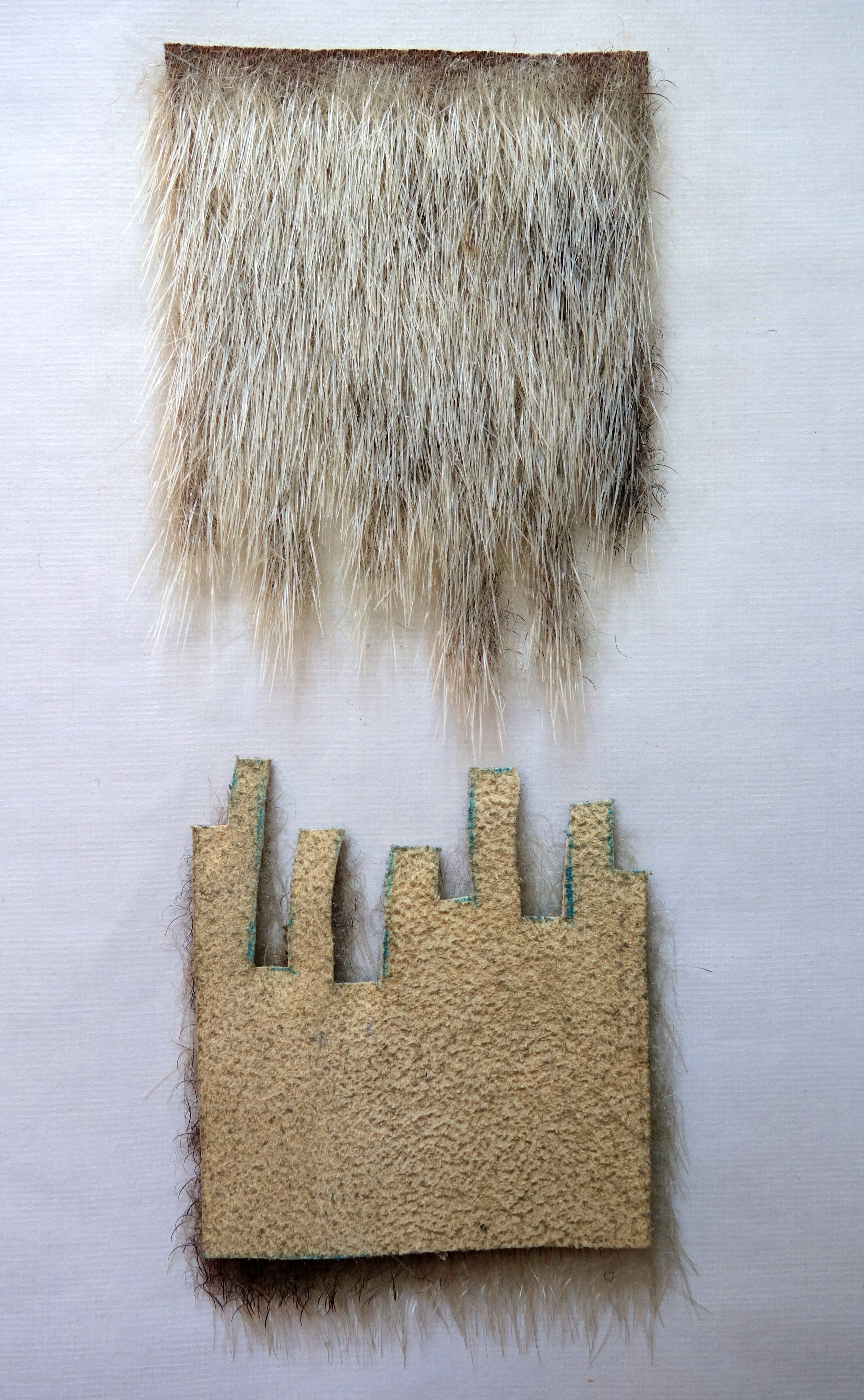 „Seehund-Verarbeitung - So verzahnt man unsichtbar das Aufsetzen oder das Einsetzen eines Stückes“. Otto Bennewitz, Werkstattbuch für Kürschnerlehrlinge, 3. Lehrjahr, Wochen-Arbeitsbericht 1963.